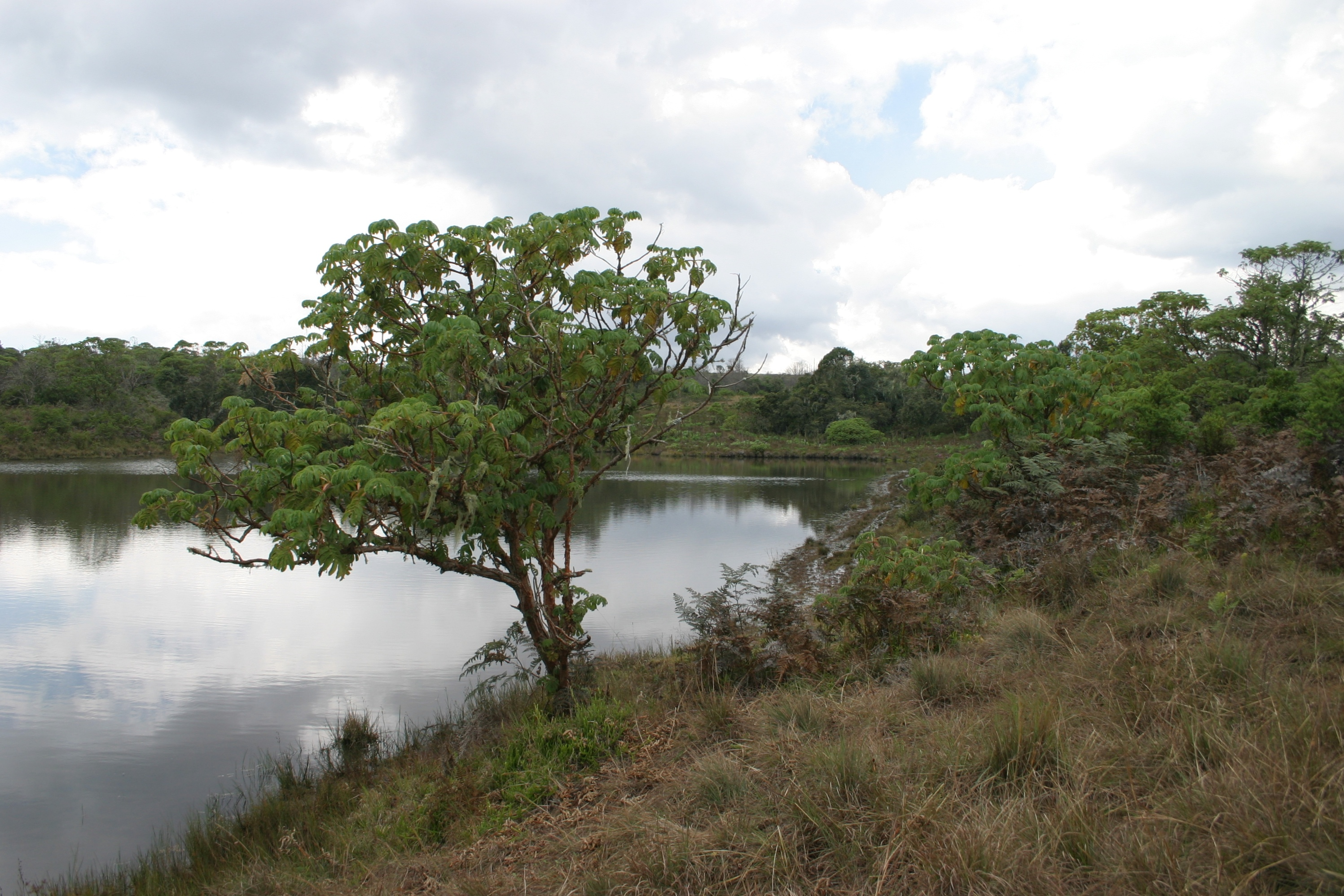 Lake Kaulime, Nyika Plateau, Malawi